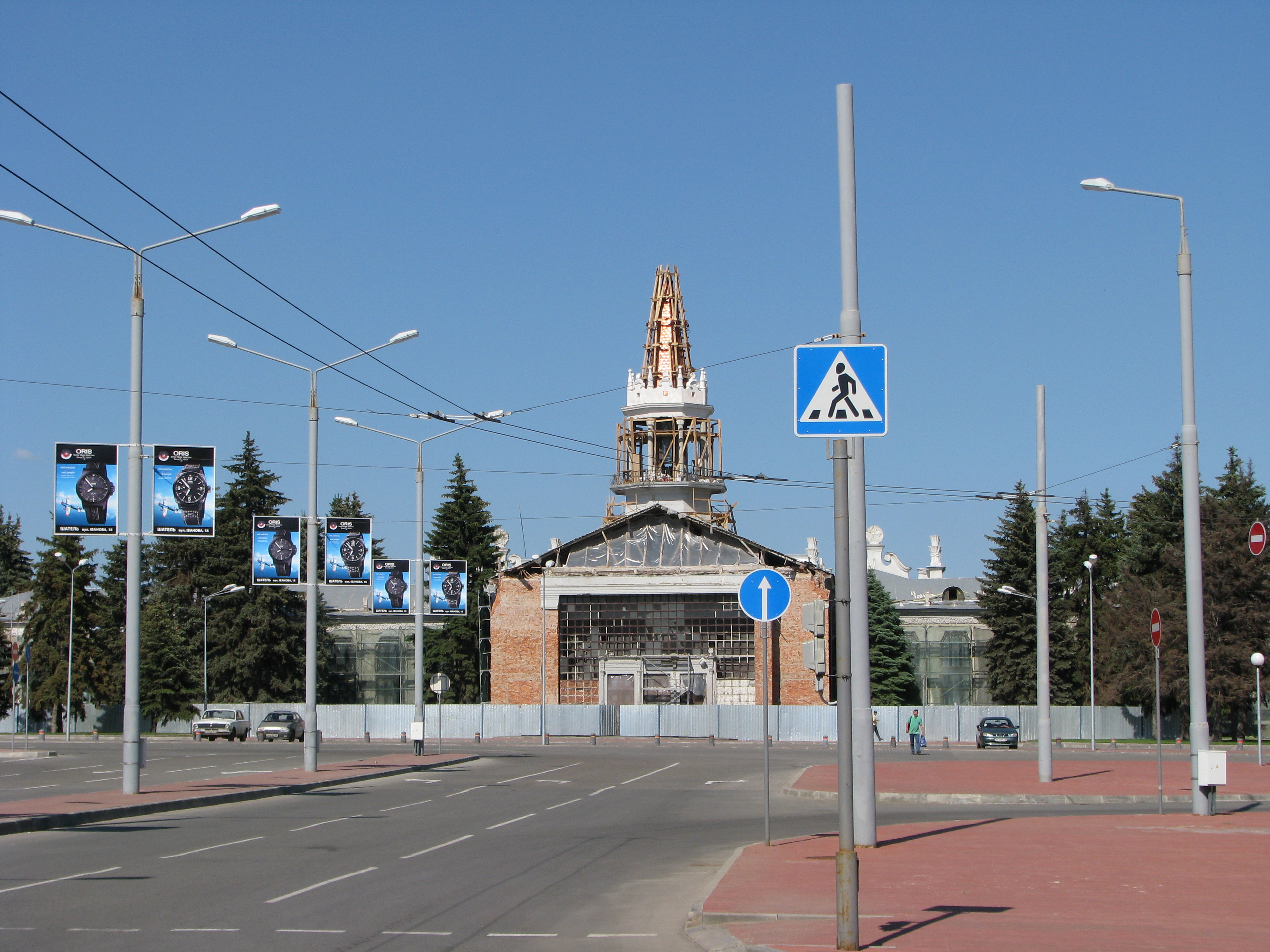 Аеровокзал, Харків, пр. Гагаріна, б/н